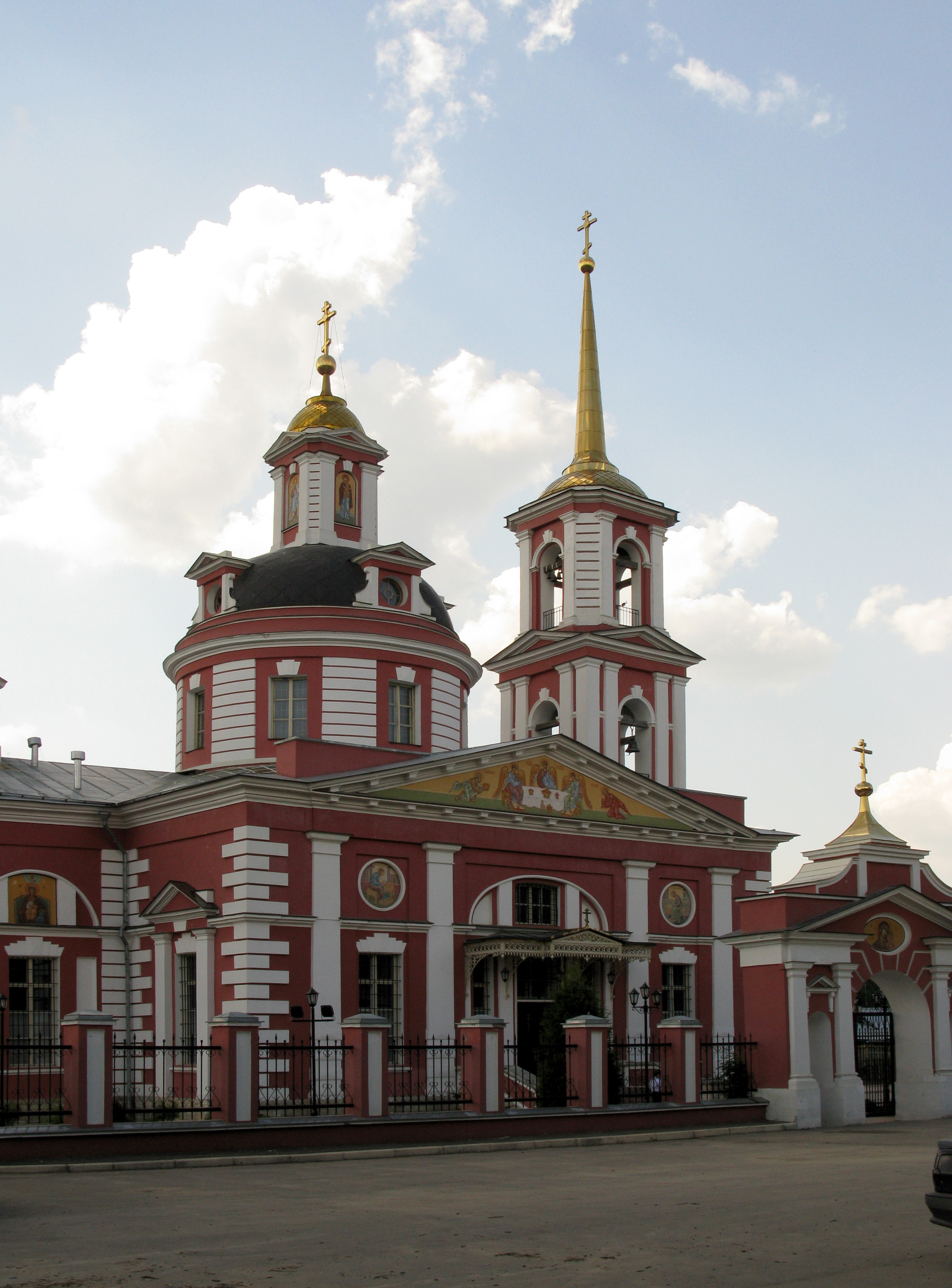 Храм Сергия Радонежского в селе Алмазово (Московская область, Щёлковский район).